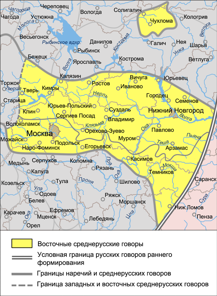 Карта восточных среднерусских говоров. Источники: Захарова К. Ф., Орлова В. Г. Диалектное членение русского языка — 2-е изд. — М.: Едиториал УРСС, 2004. — ISBN 5-354-00917-0, с. 141. Касаткин Л. Л. Русские диалекты. Лингвистическая география Русские. Монография Института этнологии и антропологии РАН — М.: Наука, 1999, с. 96. Федеральная целевая программа Русский язык. Региональный центр НИТ ПетрГУ